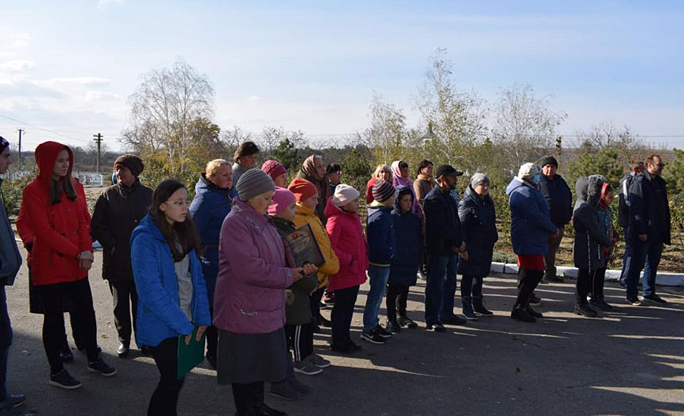 Презентація дошки